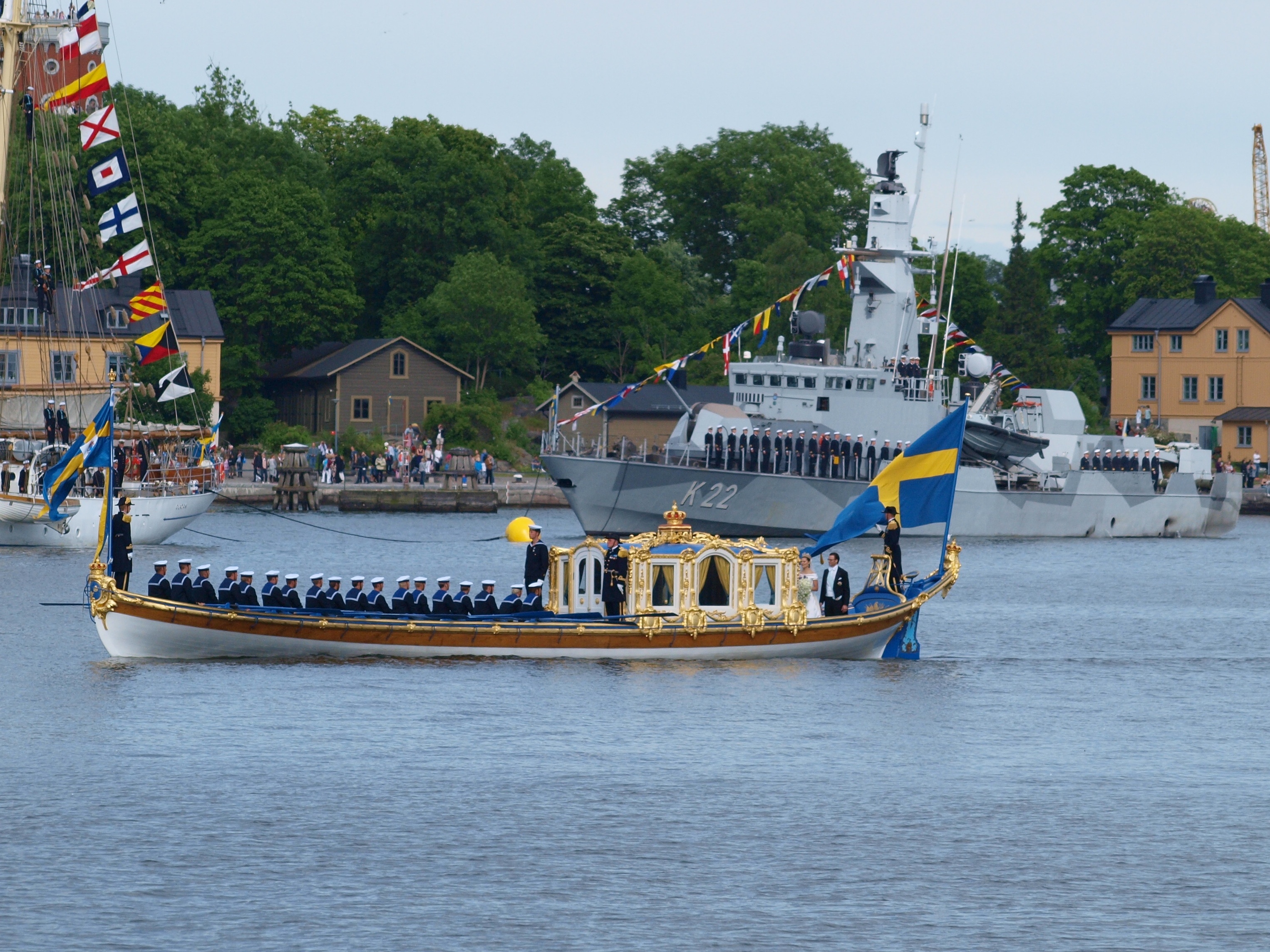 Bröllopet mellan Victoria och Daniel. Vasaorden, HMS Gladan och HMS Gävle.